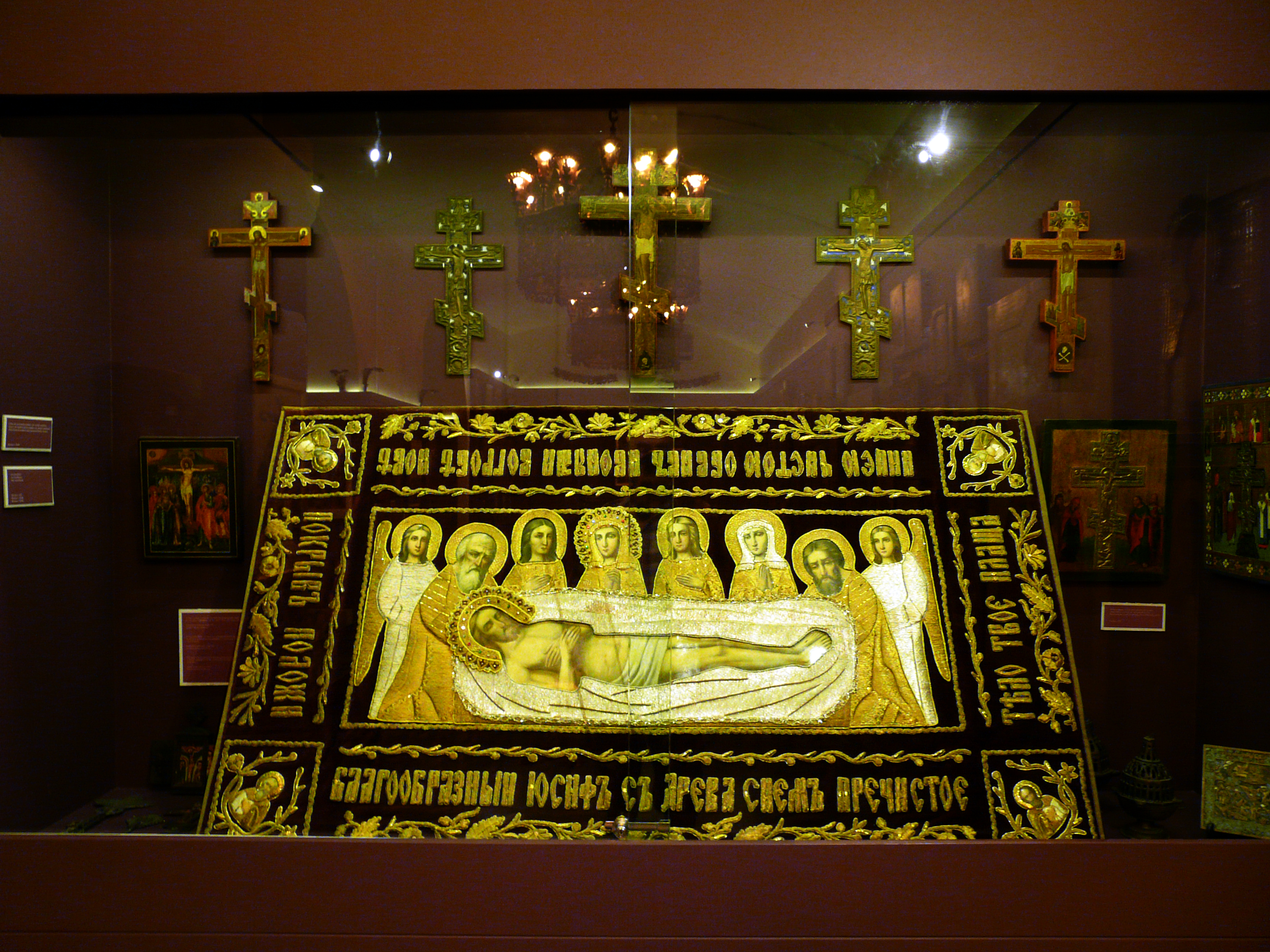 Церковная утварь